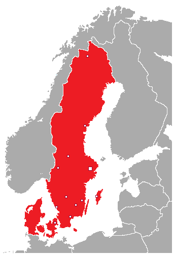 Kart över Skyways destinationer